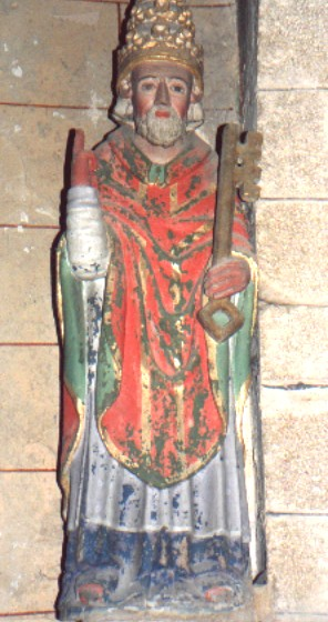 église Argol, statue St Pierre, denez goasguen.